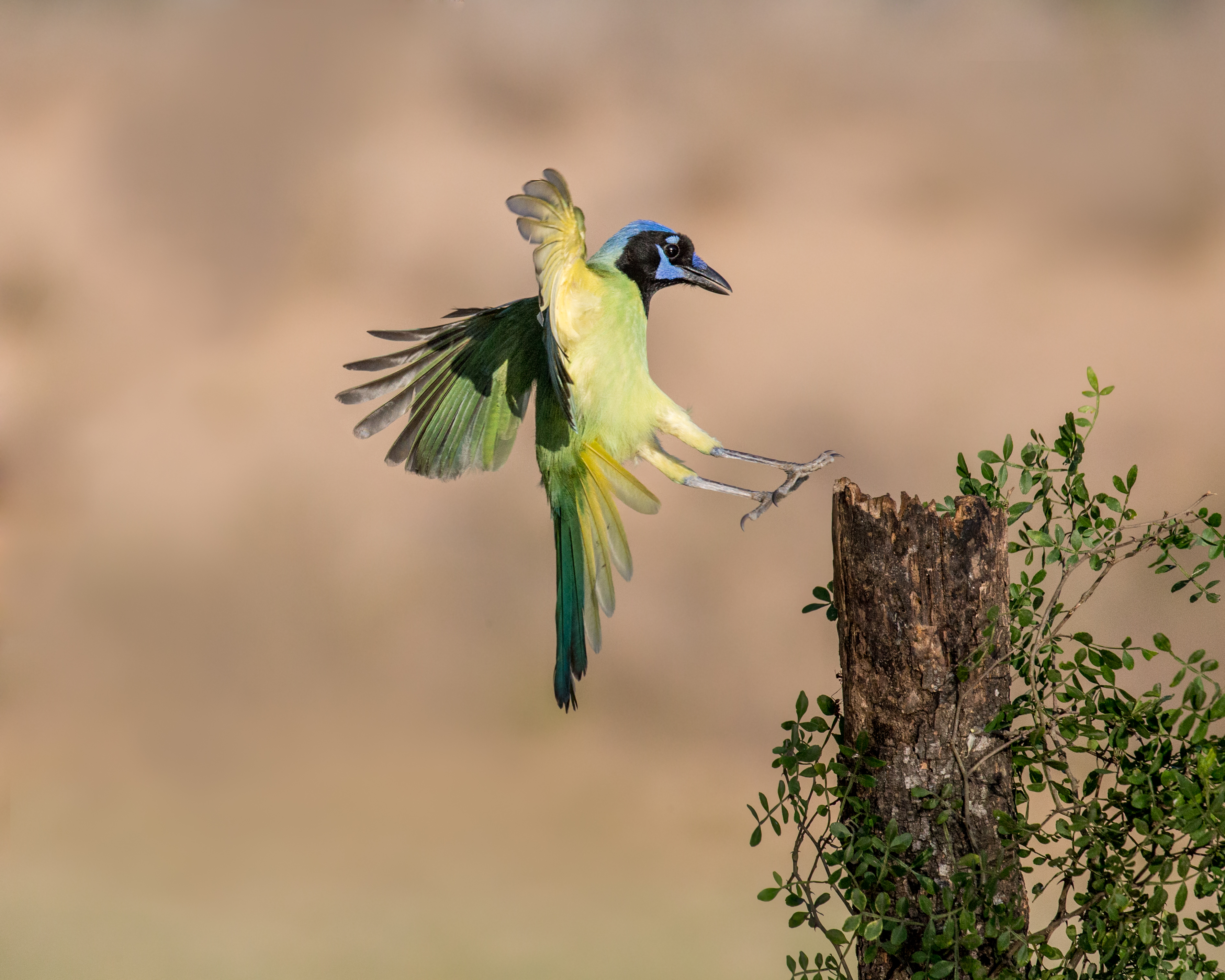 Taken in Texas